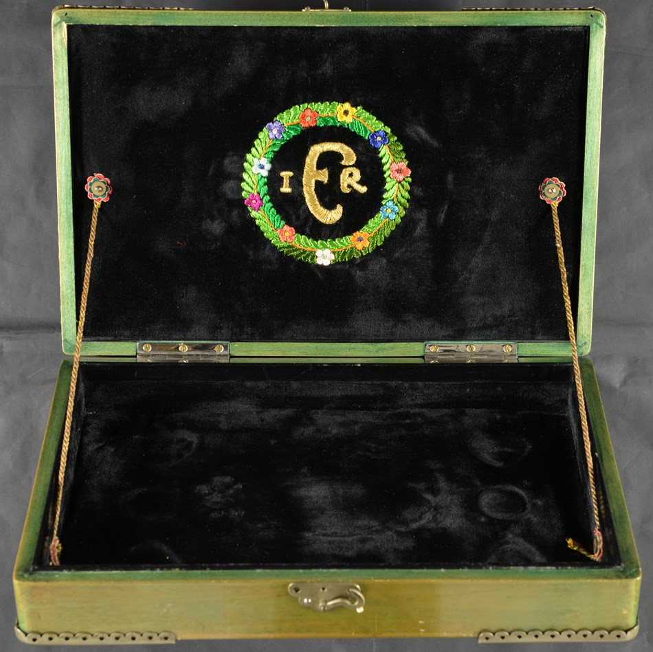 Поздравителен адрес от унгарския ювелир Андраш Шима (Банди) (Andràs Schima – Bandi) до цар Фердинанд І в знак на уверение за съюзническа вярност и като символ на българо-унгарското братство. Пожон, Австро-Унгария, (Братислава, Словакия). 1916 г. Оригинал. Ръкопис. Унг. ез.